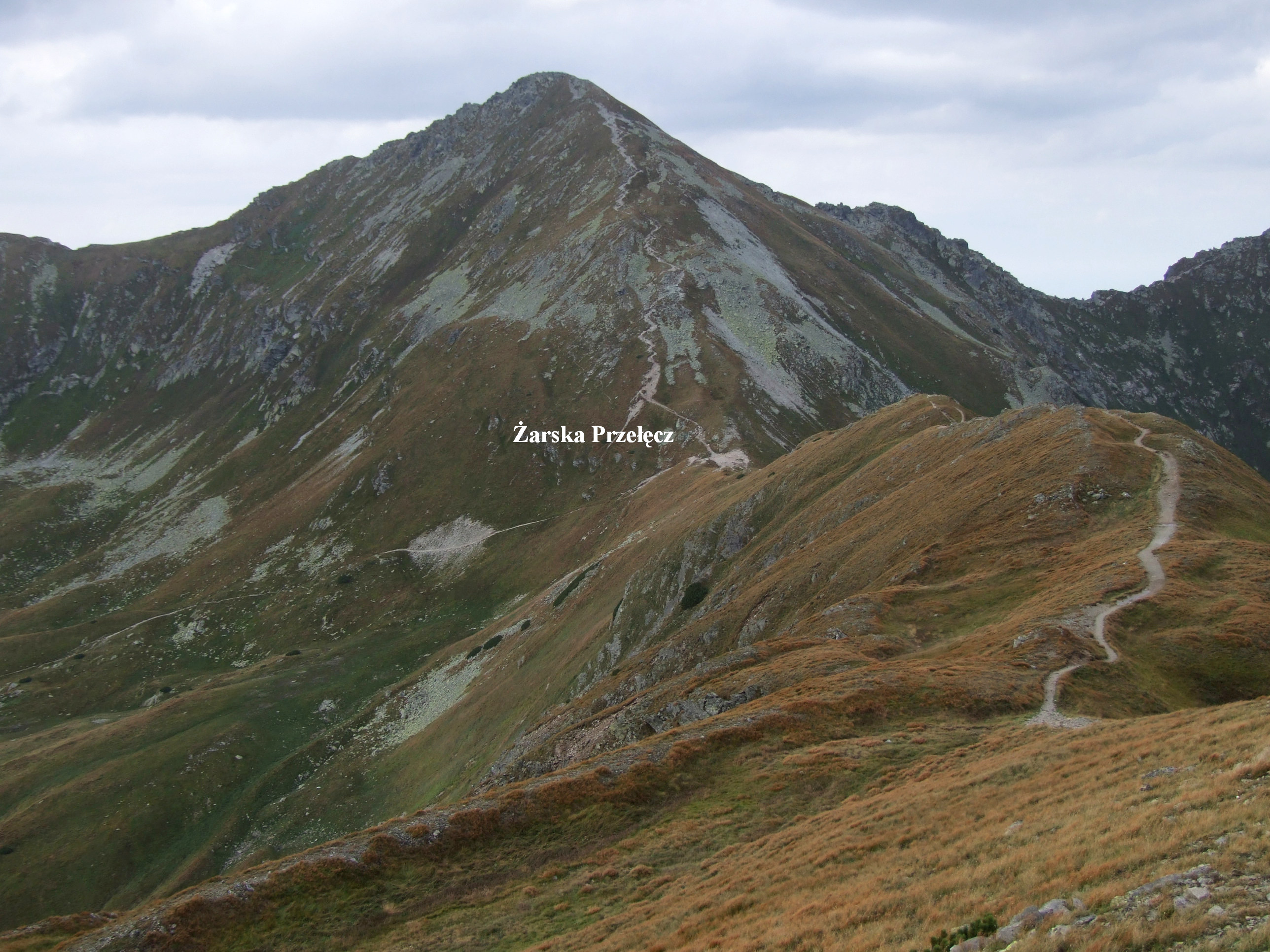 Rohacz Płaczliwy, Żarska Przełęcz (West Tatra Mountains)